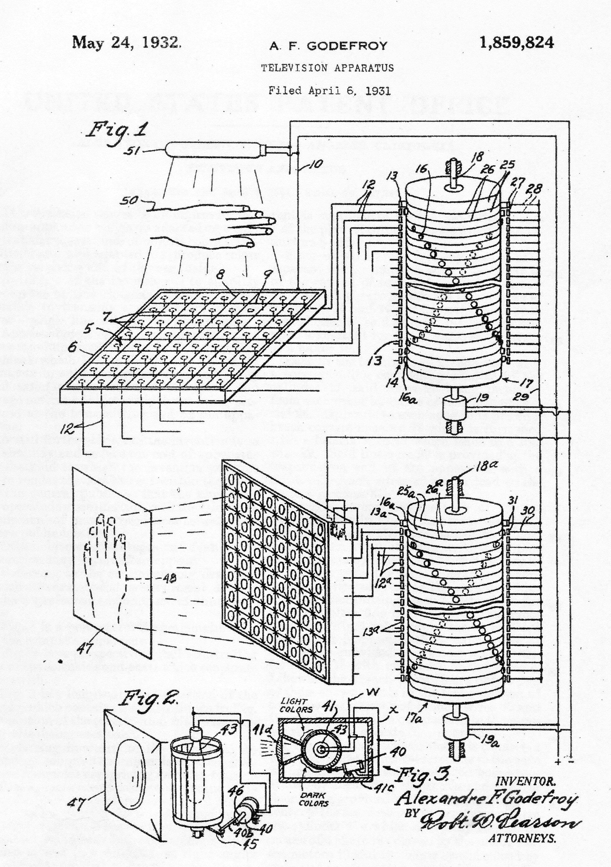 Dessin détaillé et description de l'appareil télévision d'Alexandre Ferdinand Godefroy 1931